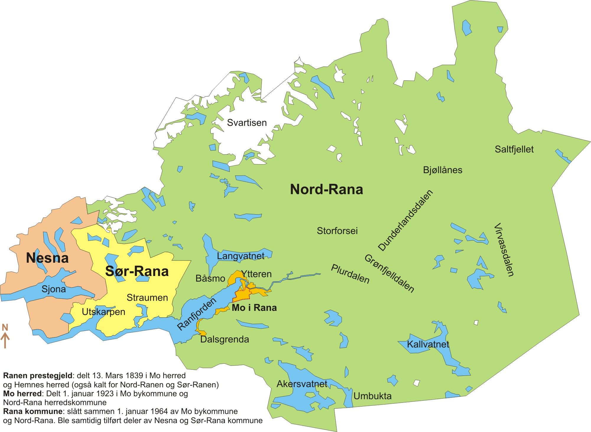 Kart over Rana kommune i Nordland (Map over Rana kommune in Nordland, Norway)